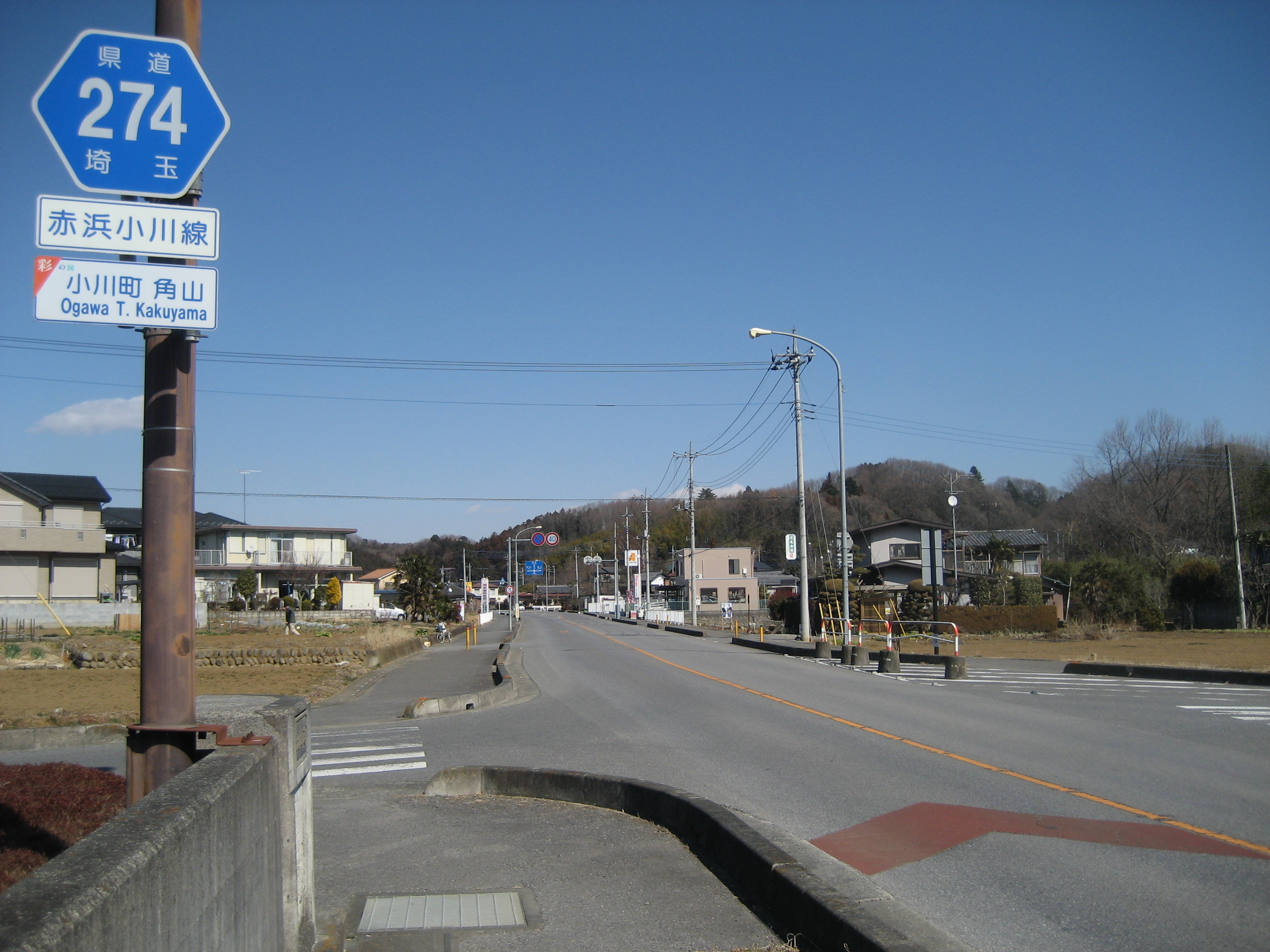 埼玉県道273号線小川町角山付近